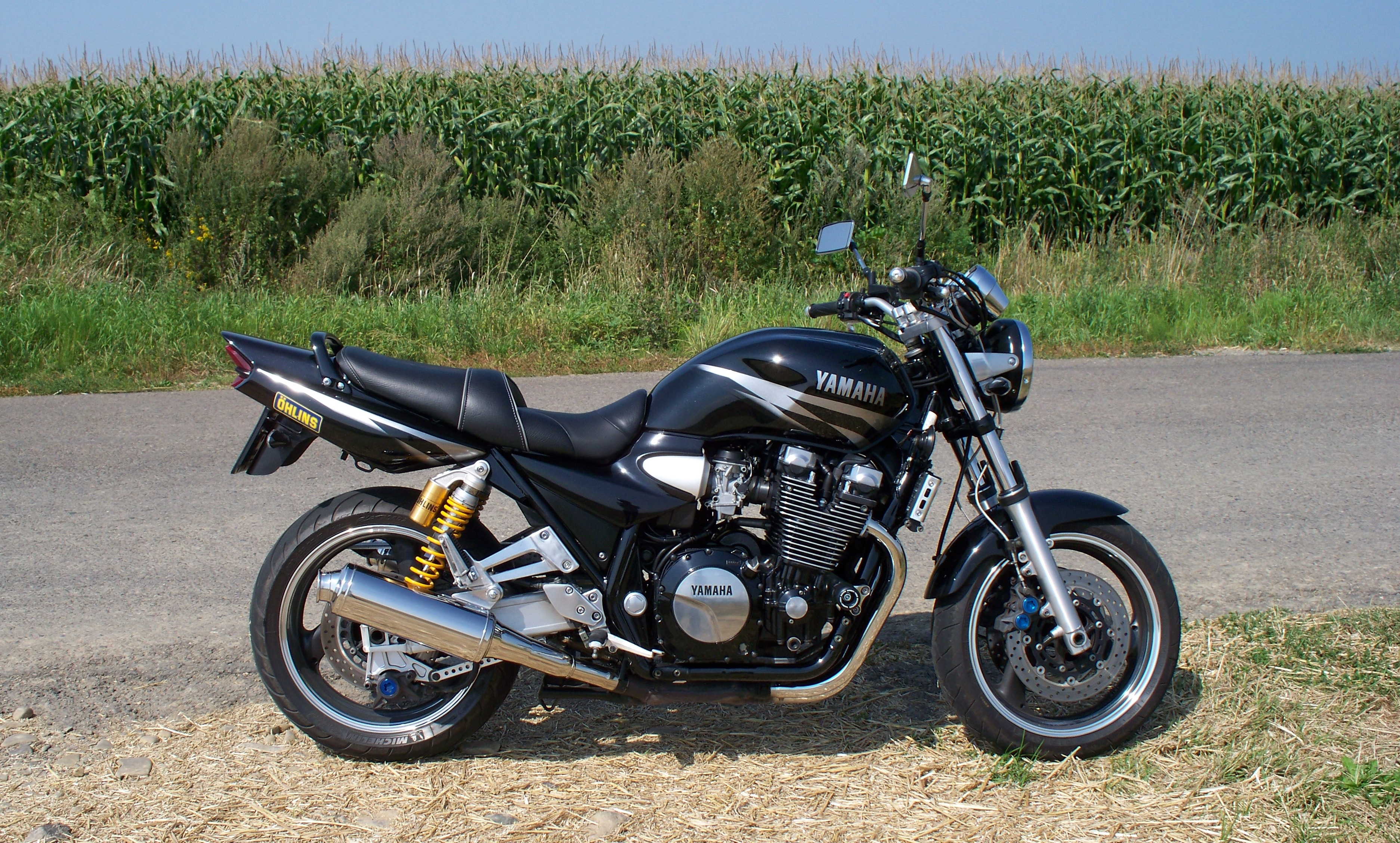 Yamaha XJR 1300 - RP06 2002r.